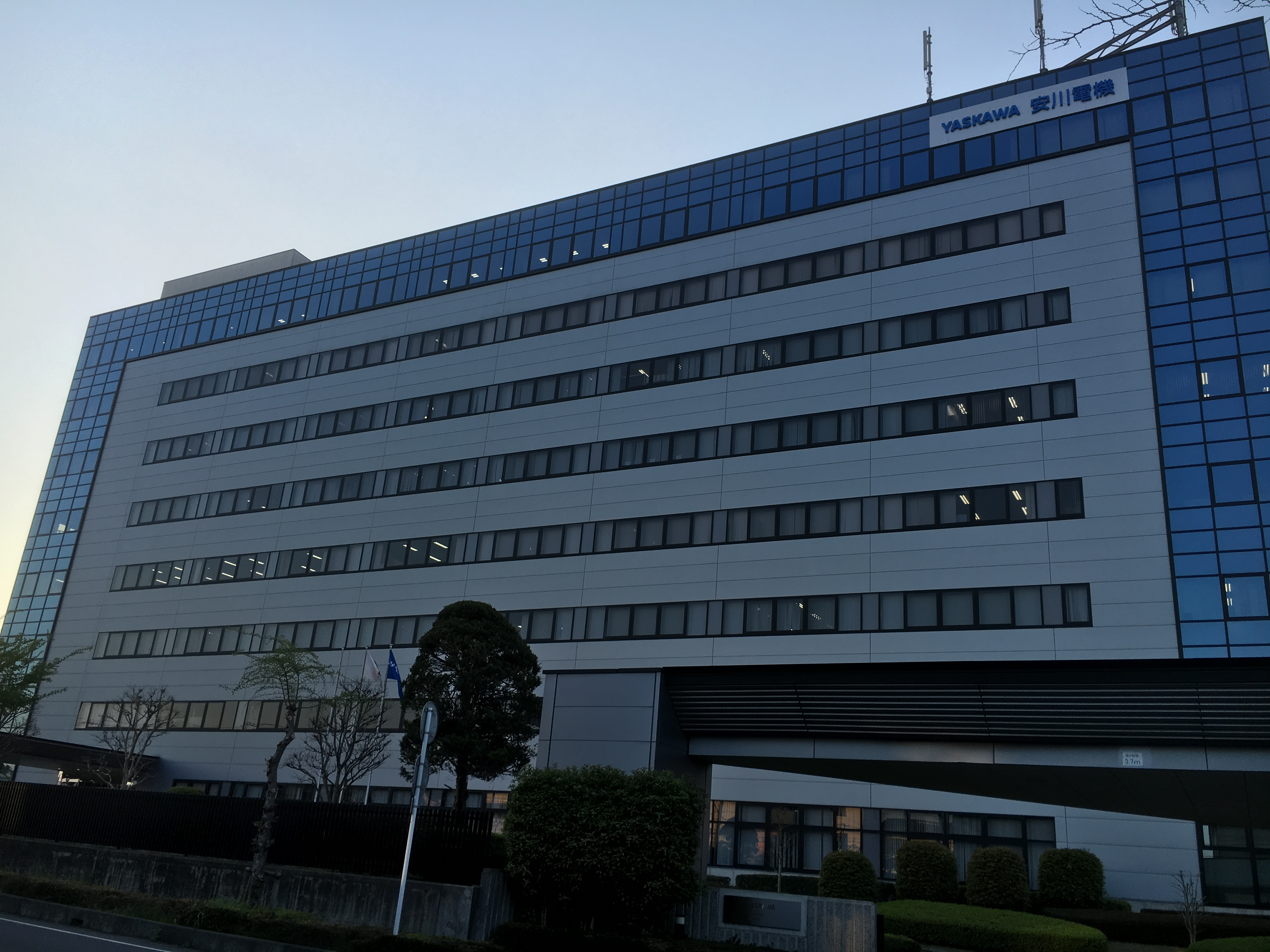 安川電機入間事業所ソリューションセンター。敷地外より撮影。